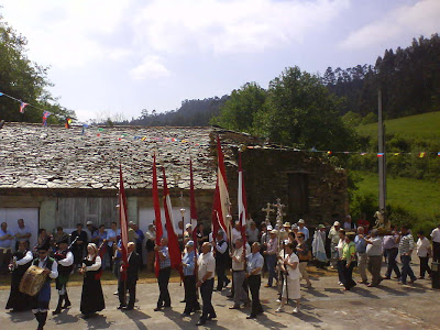 Momento da procesión das Cruces 2010